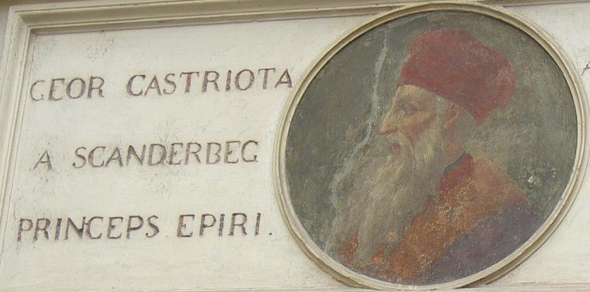 Scanderbeg, bild av Alers, augusti 2004. Från Piazza Scanderbeg Skanderbeg